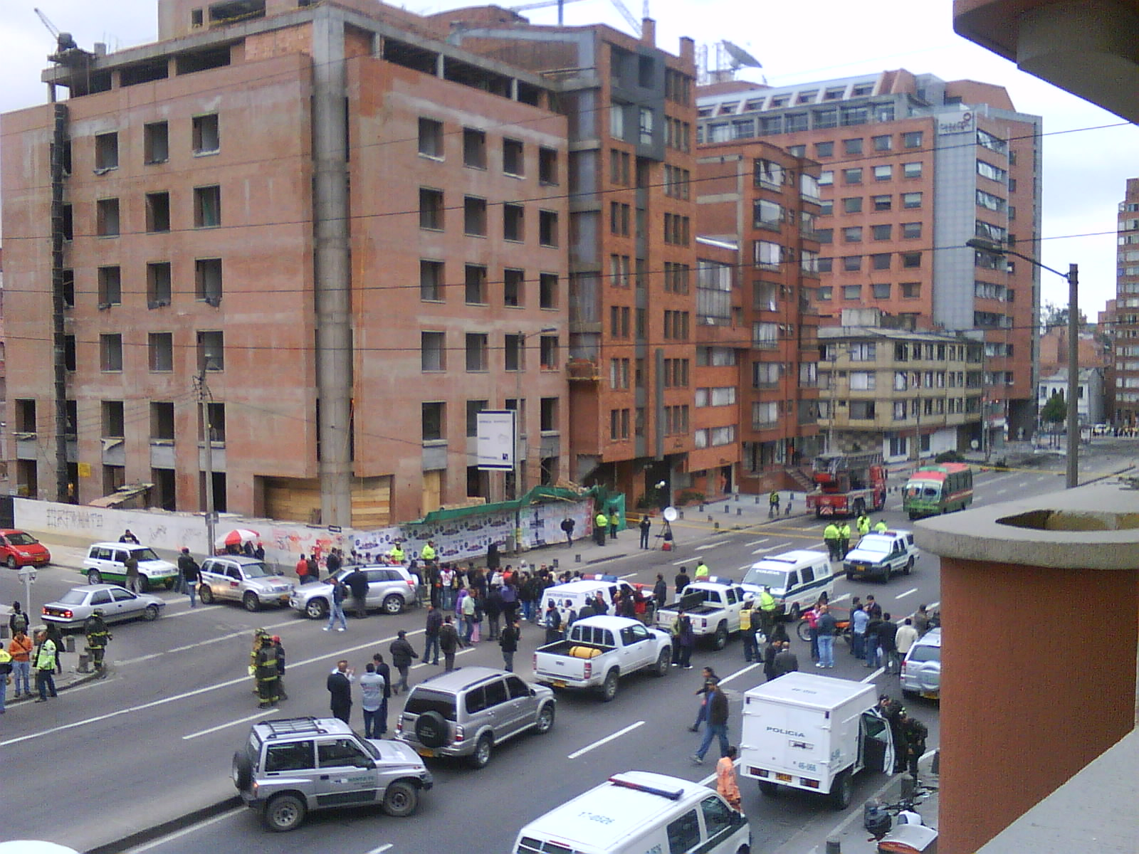 Una hora después de la explosión Carro bomba Caracol Radio 20100812